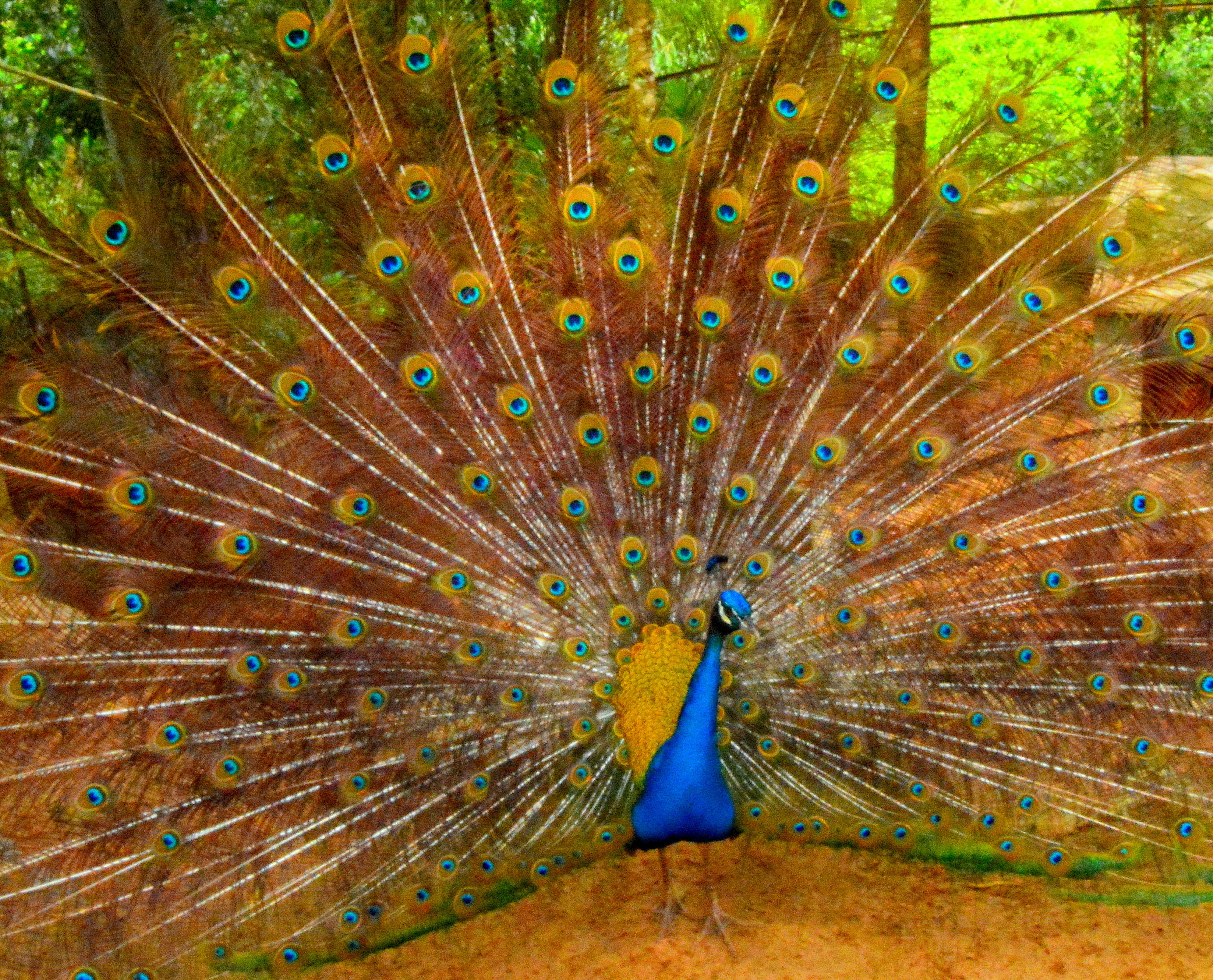 শেখ রাসেল পক্ষিশালা এবং ইকোপার্ক